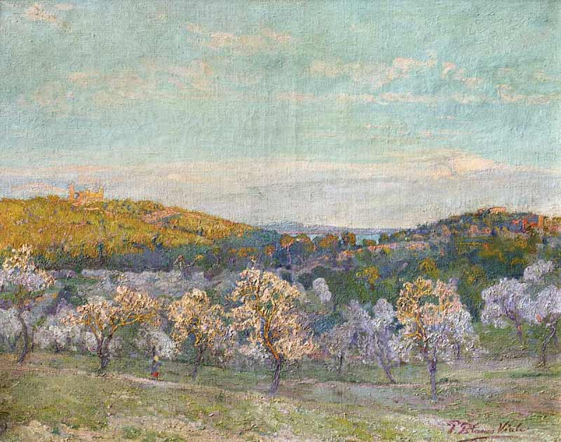 Obra del pintor uruguayo Pedro Blanes Viale (1879 - 1926) "Castillo de Bellver", óleo sobre tela de 73 x 91 cm.